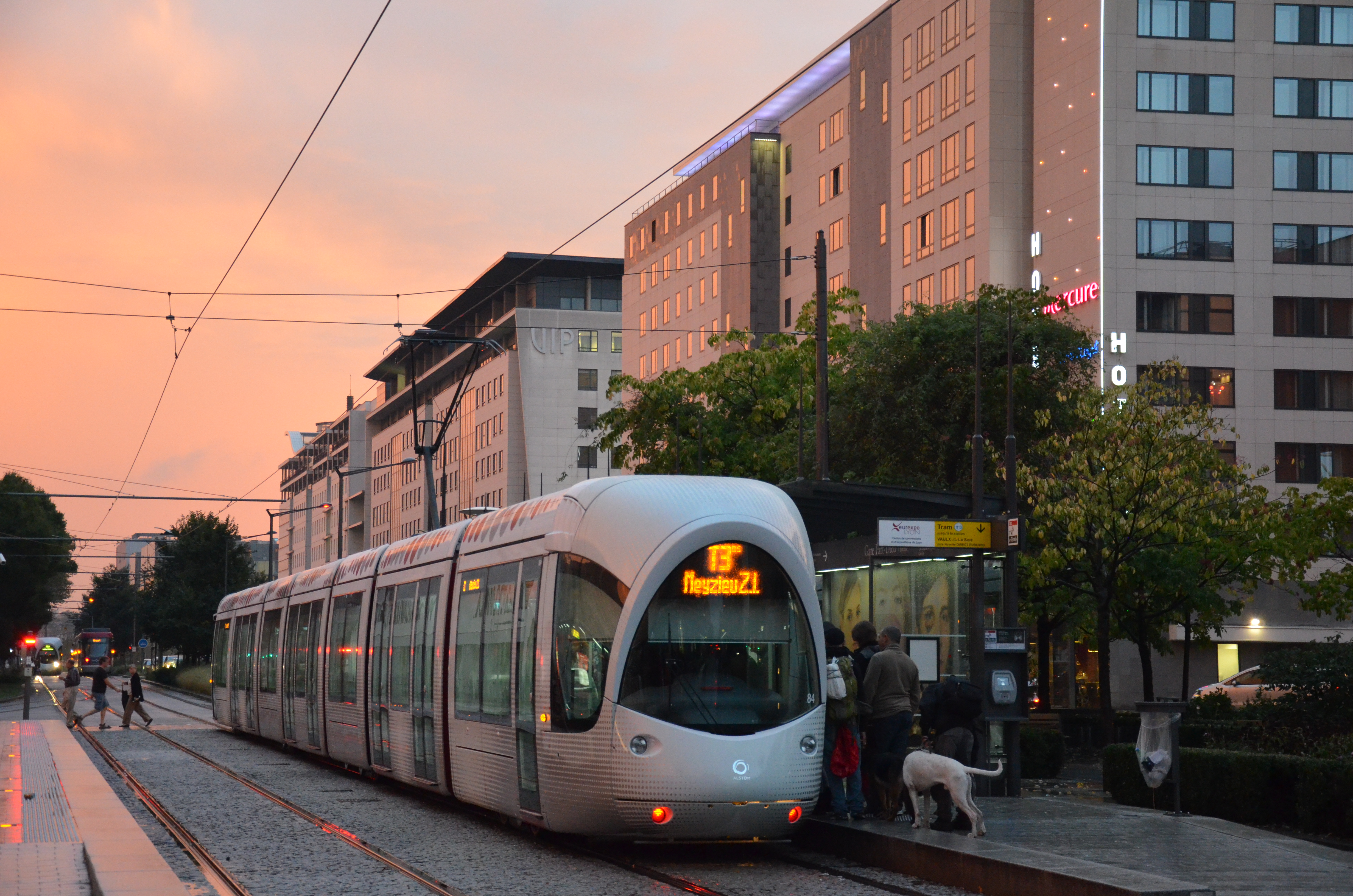 La rame Alstom Citadis 402 n°884 du réseau TCL est à quai à la station Gare Part-Dieu Villette afin d'assurer une course sur la ligne T3 en direction de Meyzieu Zone Industrielle.